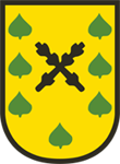 Znak obce Jitkov